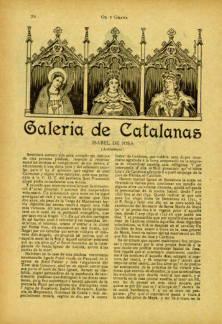 pàgina de dones il·lustres catalanes d'or y grana